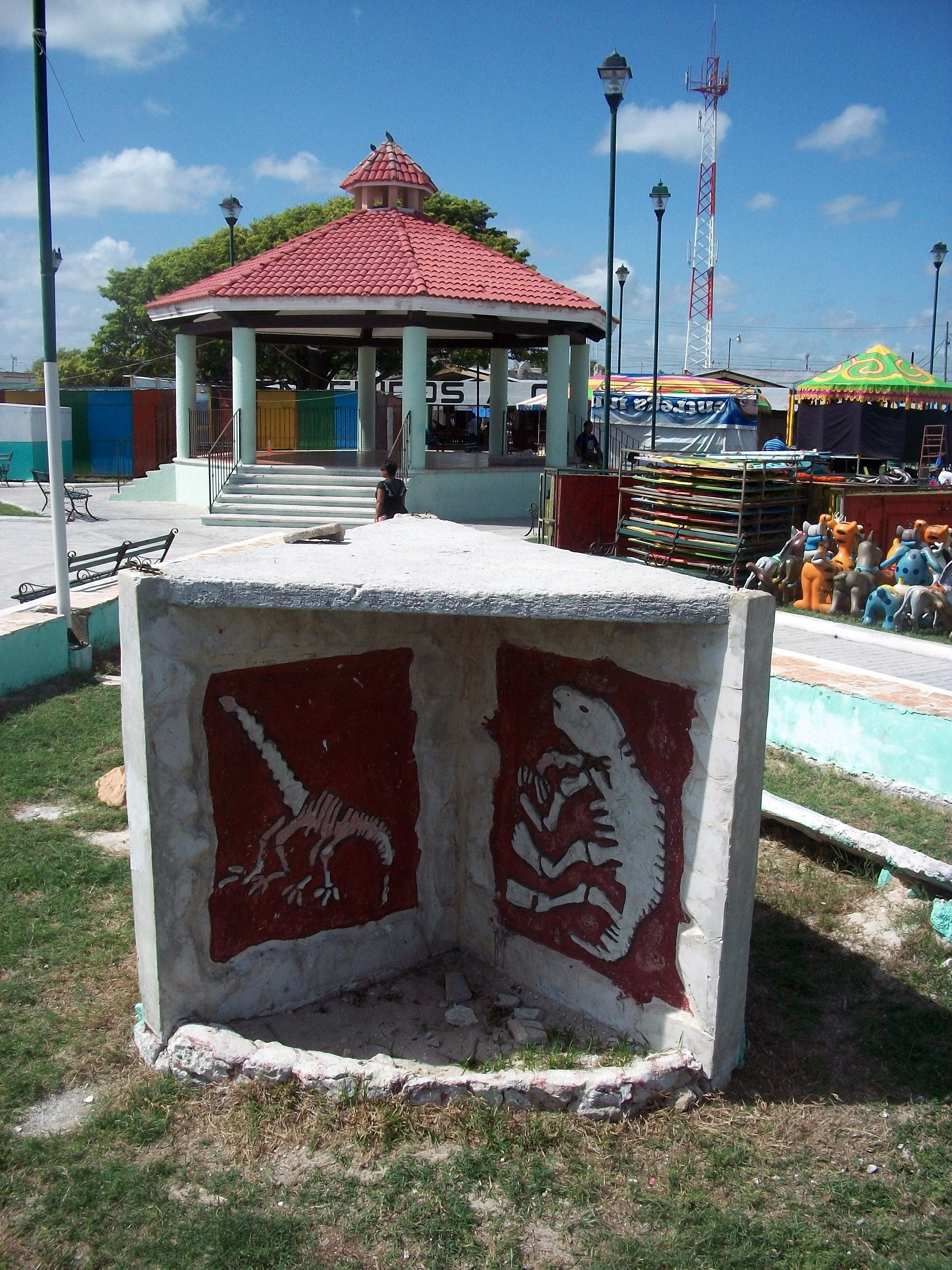 Escultura en el parque central de Chicxulub Puerto, Yucatán, México, en el sitio donde se supone impactó el meteorito que causó la extinción de los dinosaurios, hace 65 millones de años.